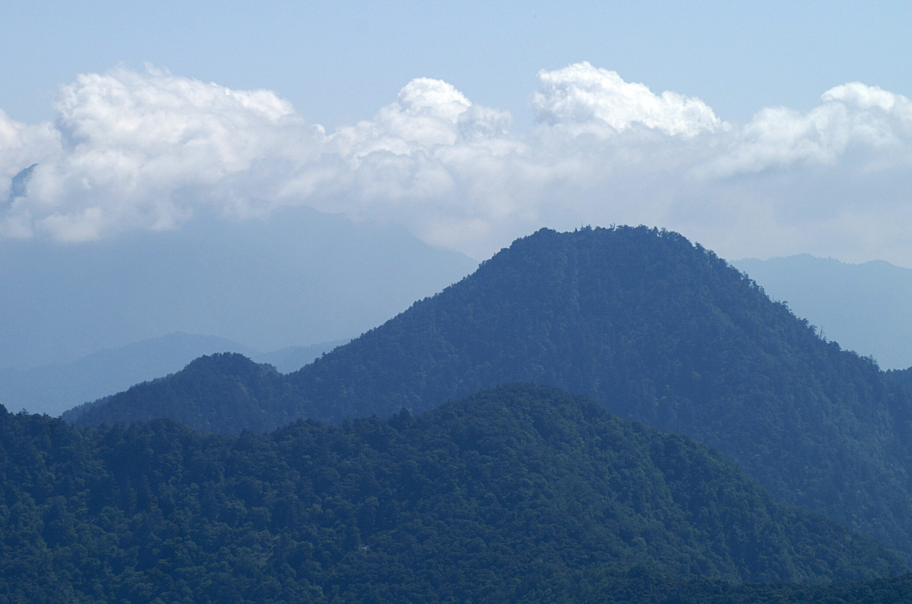 Mountain Ma Hai Pu 馬海僕富士山